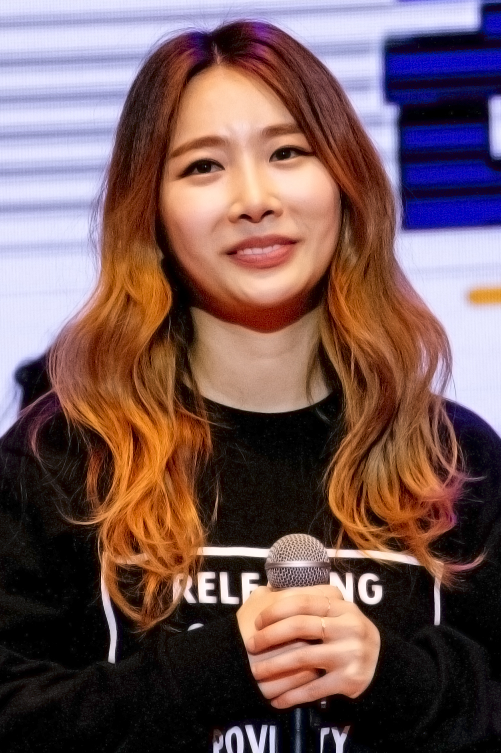 [18.03.17] 컴패션 제아 직찍